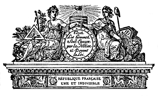 Tous les hommes sont Egaux par la nature et devant la loi. La Révolution française et l'abolition de l'esclavage t5.